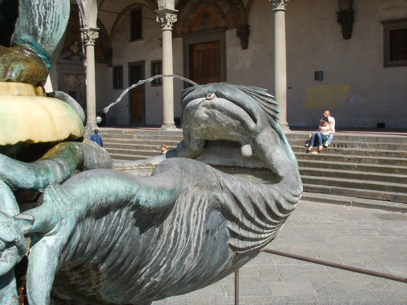 Prima fontana dei mostri marini